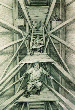 Карл Петер Мазер. Промывка золота в Восточной Сибири 1849—1850. Москва, Государственный Исторический музей